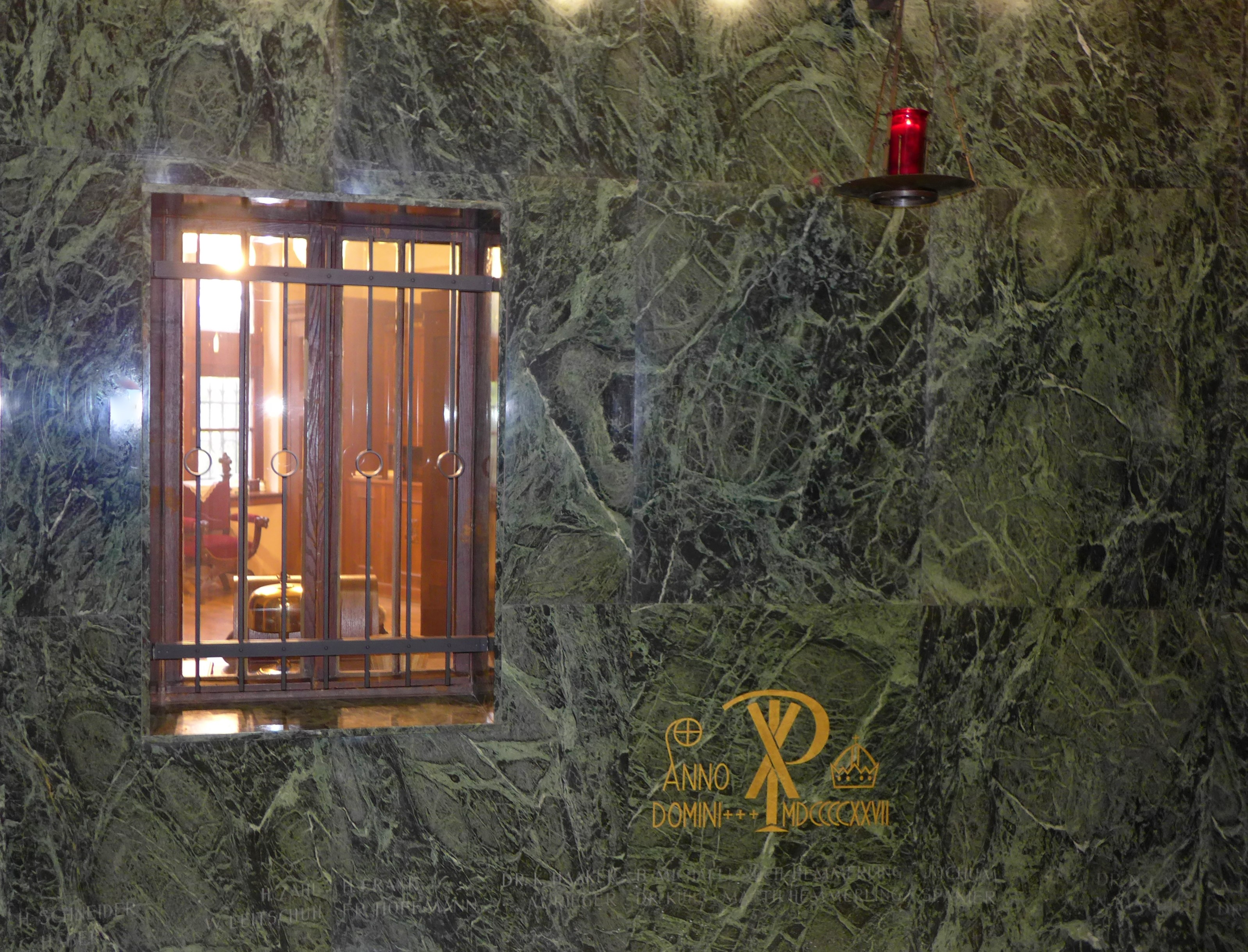 Christkönig-Kirche (Saarbrücken), Grundstein der Kirche mit Ewigem Licht und Fenster zur Priestersakristei